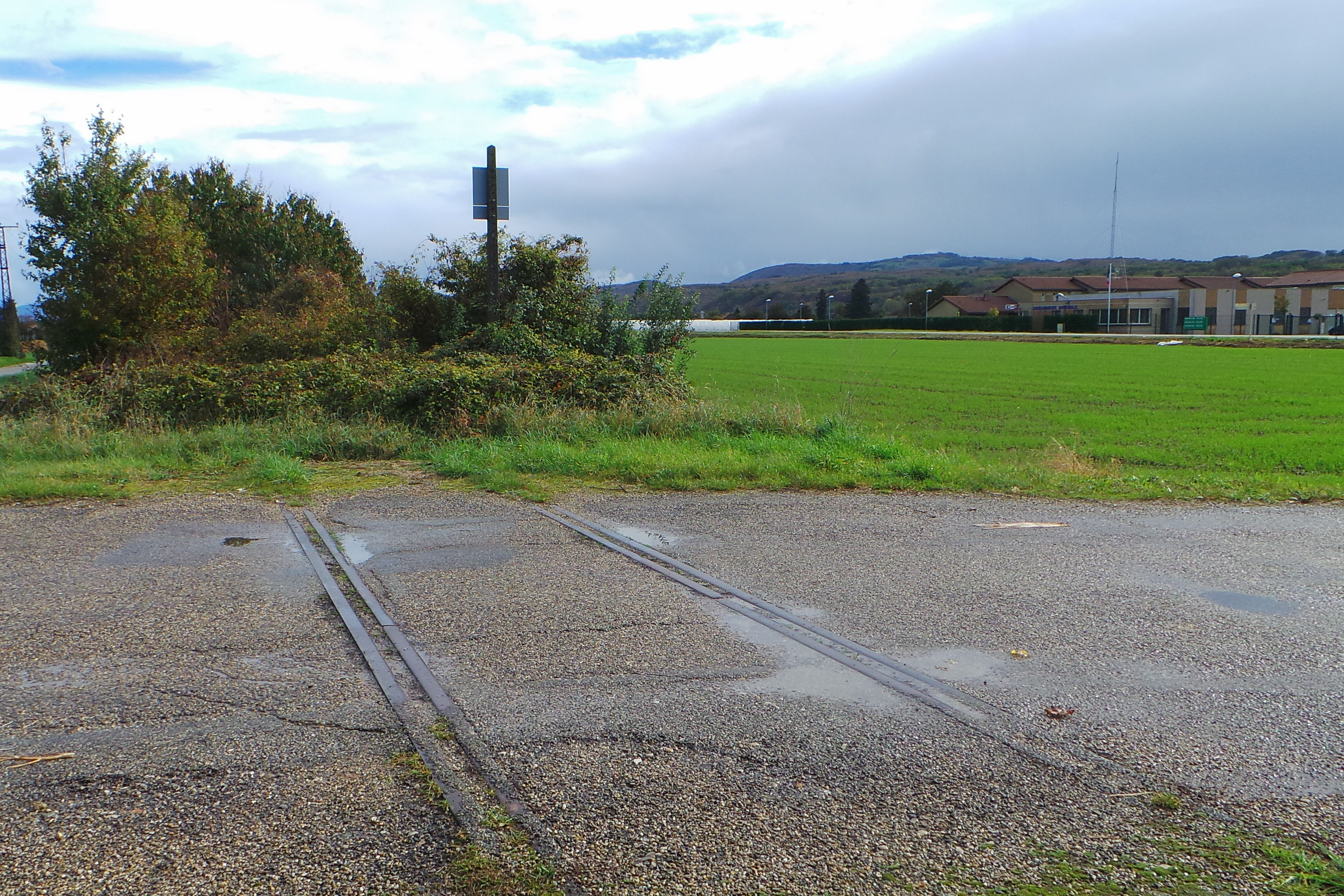 Ancienne ligne de Saint-Rambert-d'Albon à Rives à Saint-Étienne-de-Saint-Geoirs, Isère, France